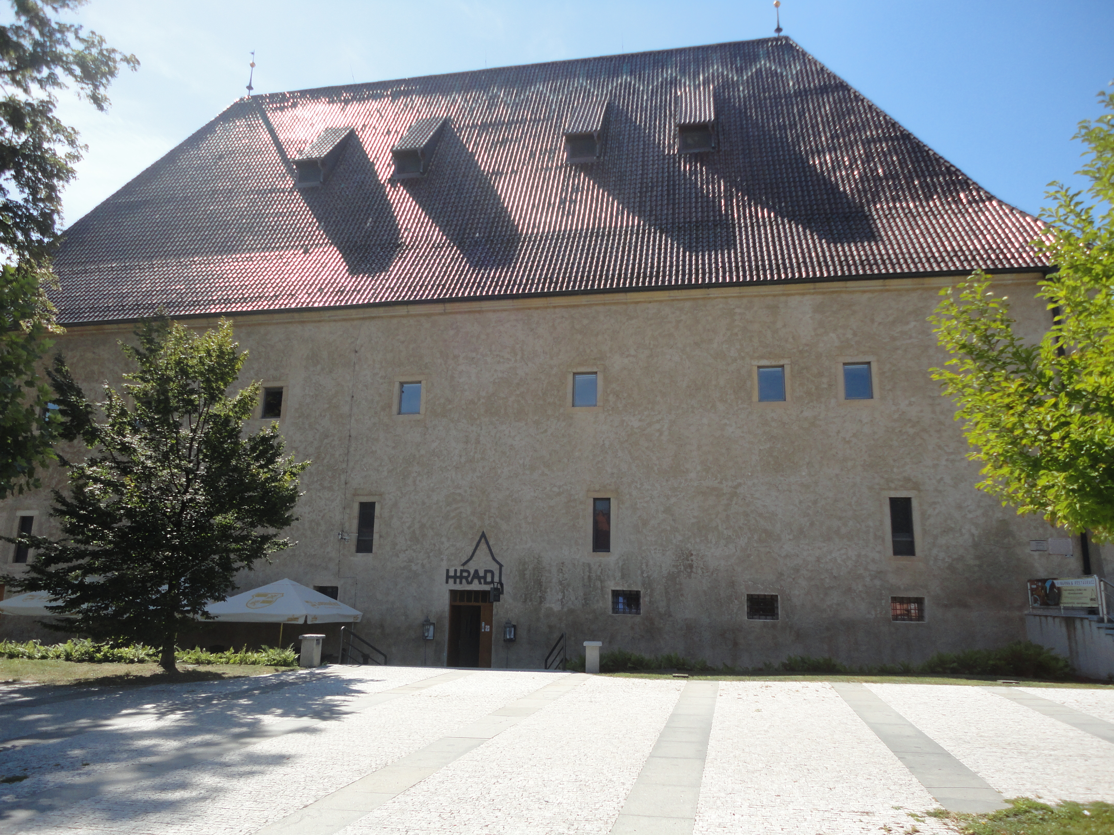 Litoměřický hrad